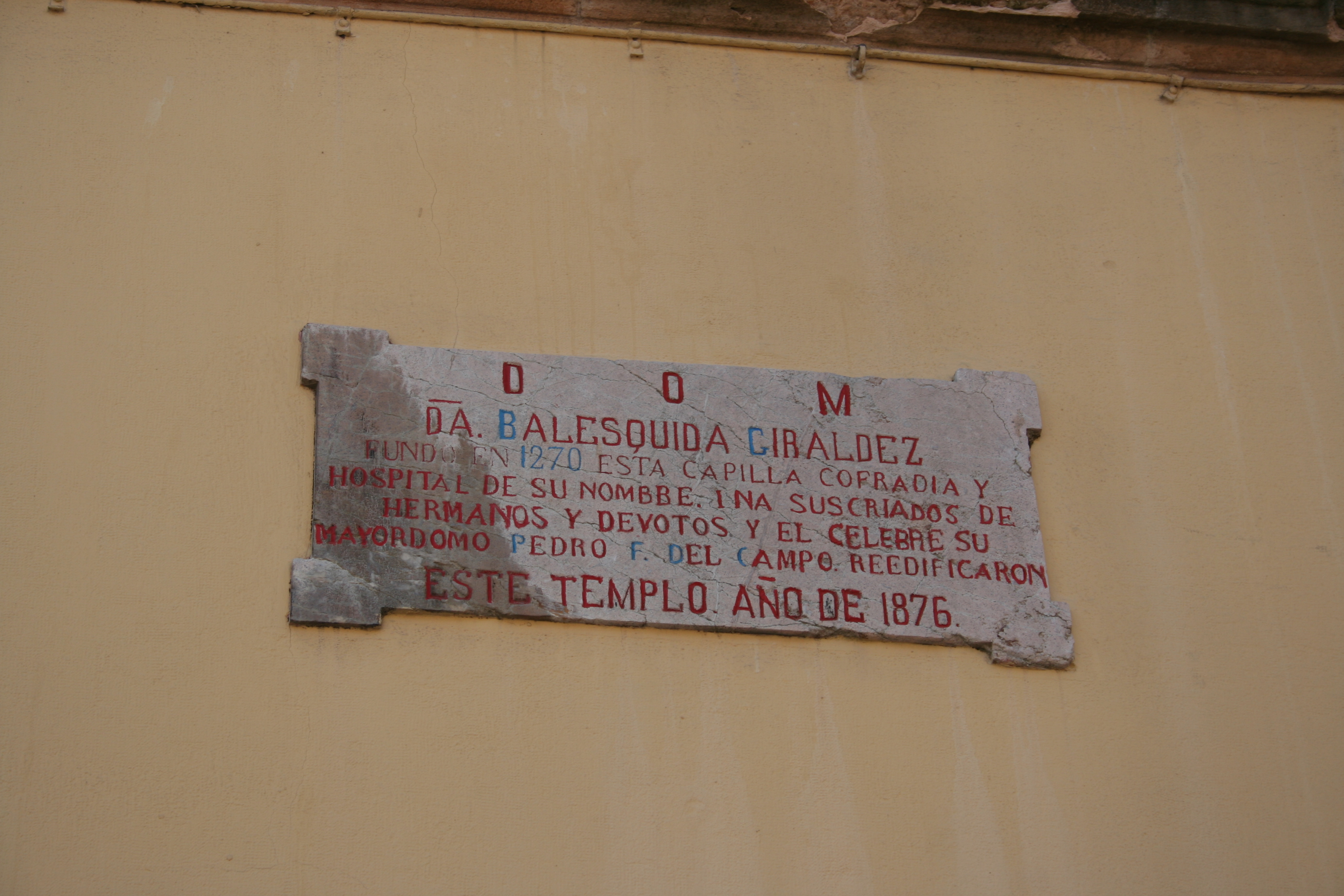 Placa conmemorativa en la capiila de la Blaesquida de Oviedo